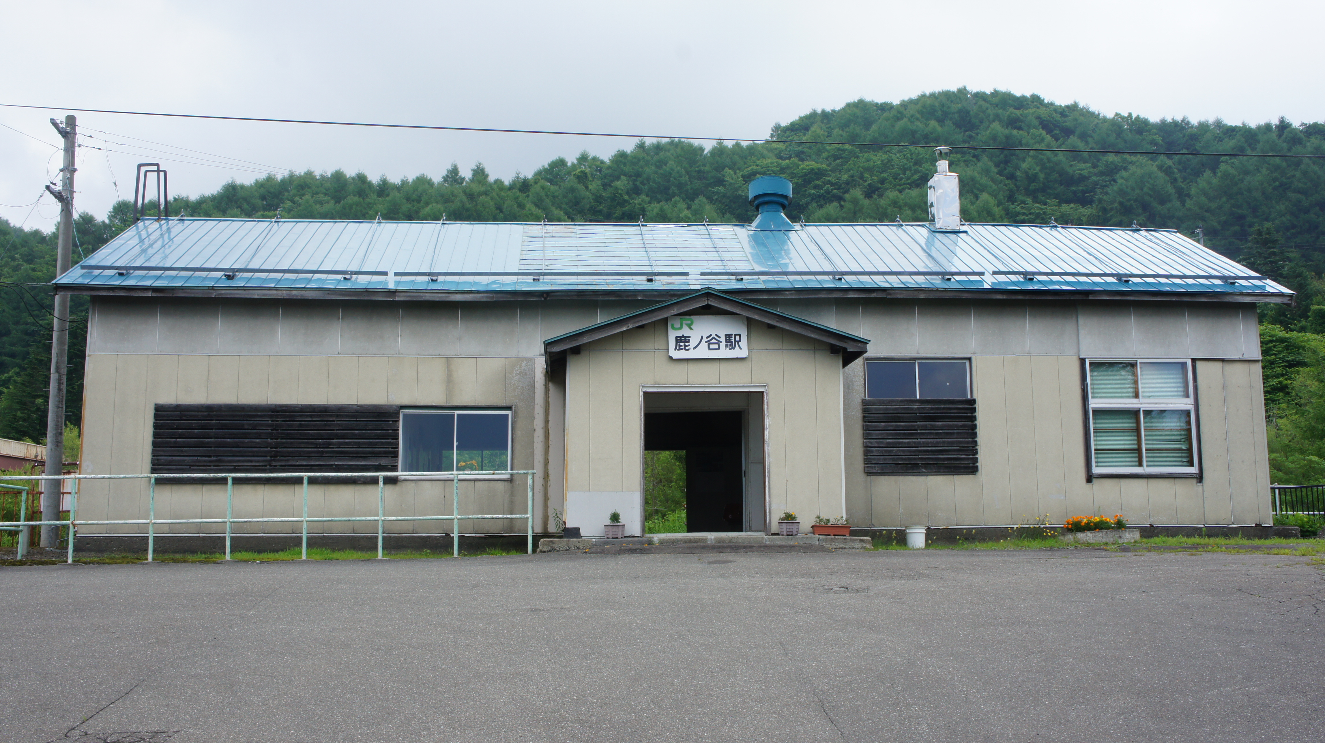 JR石勝線・鹿ノ谷駅の駅舎